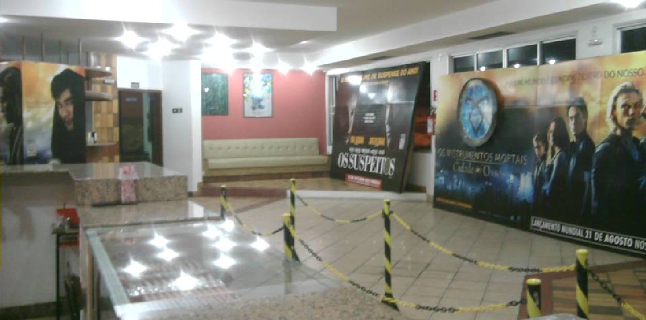 Foyer do Cine São Mateus